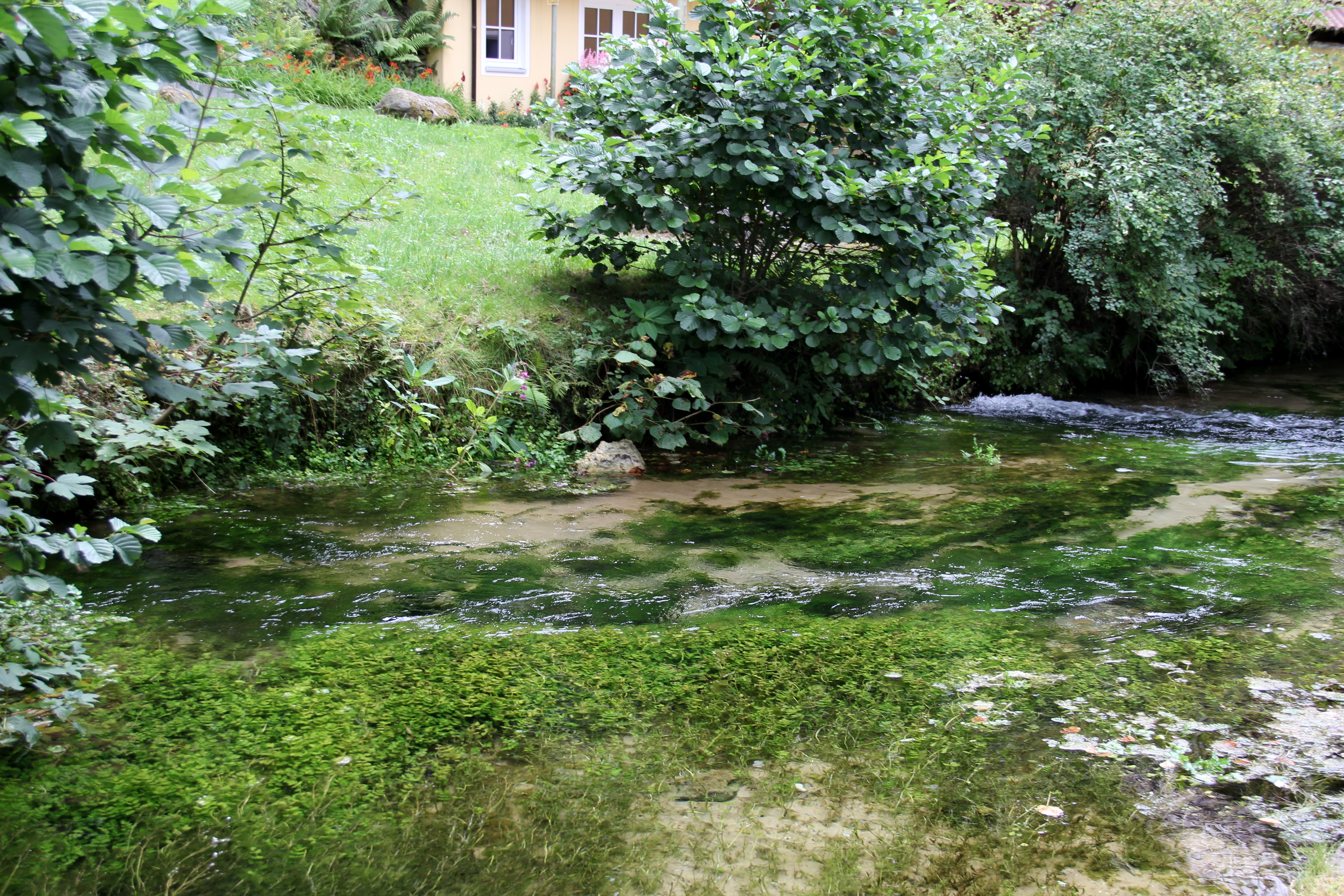 Stempfermühle, Quelle